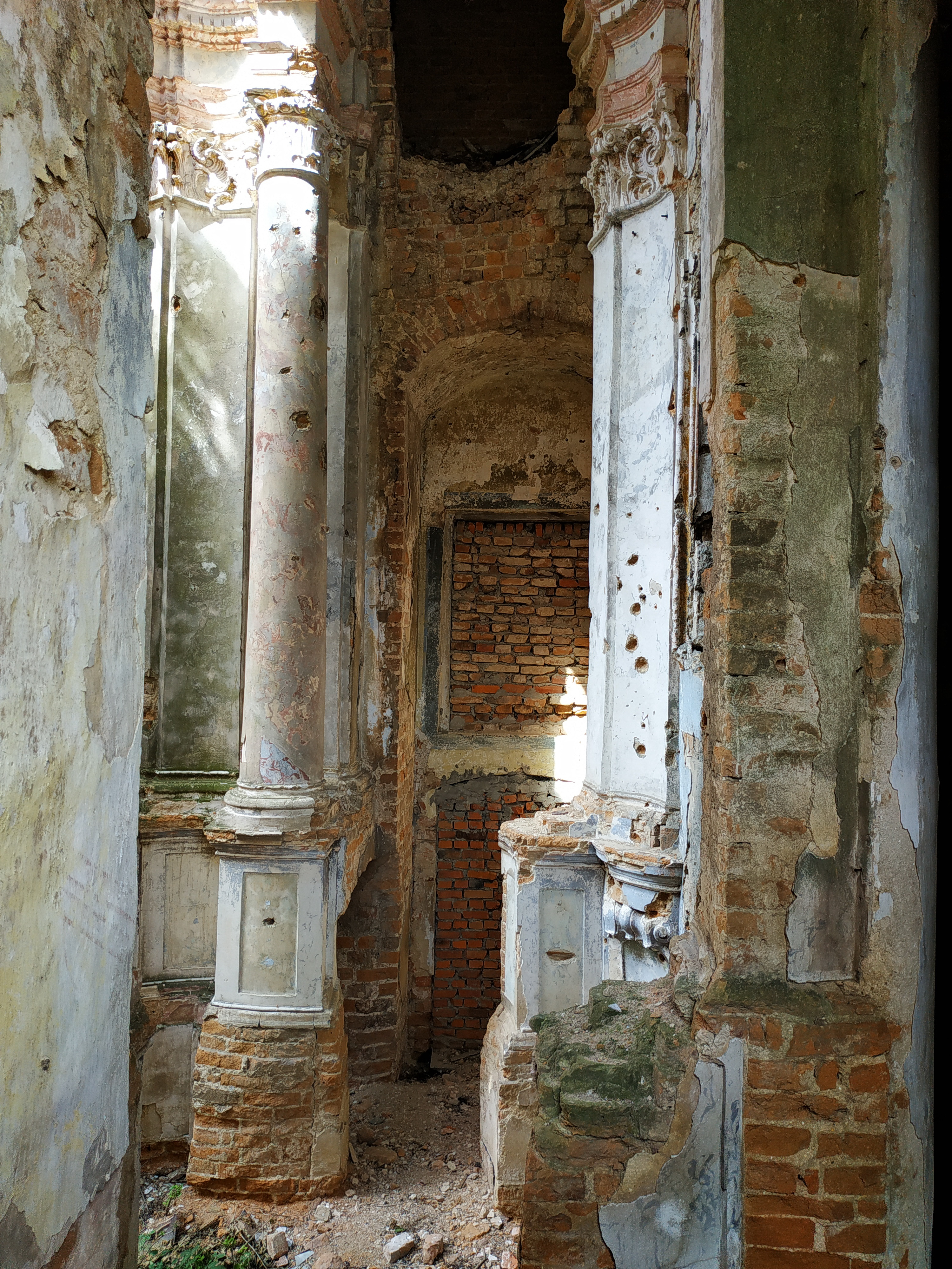 Загорівський монастир (1566 рік) - вигляд всередині - Новий Загорів (на південній околиці села) Локачинський район Волинська область Україна